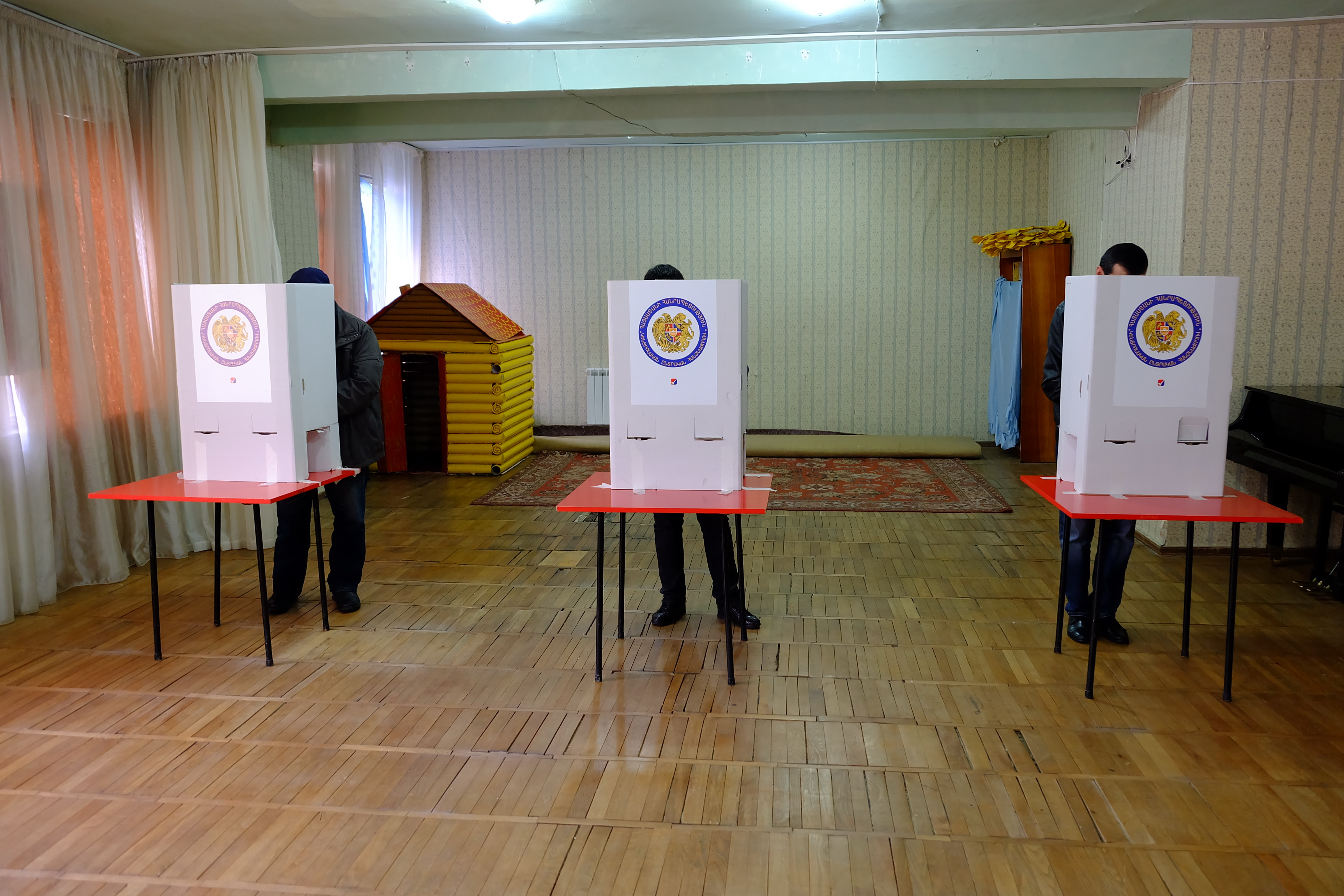 Парламентские выборы в Армении, 2 апреля 2017г. Избиратели на участке №5/05 г. Ереван